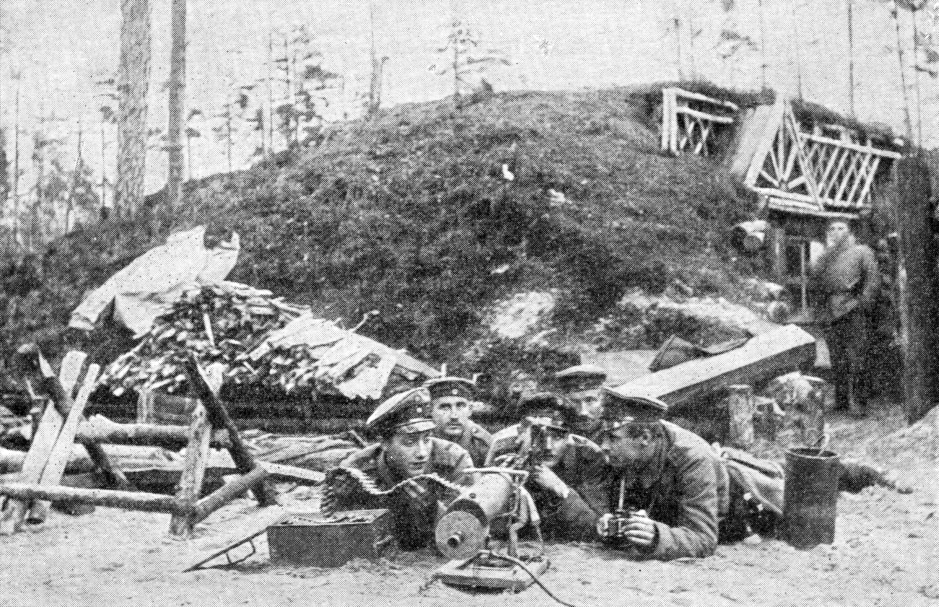 Description